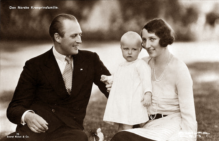 Bildet er hentet fra Nasjonalbibliotekets bildesamling Depicted person: Olav V konge av Norge Depicted person: Ragnhild, fru Lorentzen Prinsesse av Norge Depicted person: Märtha kronprinsesse av Norge